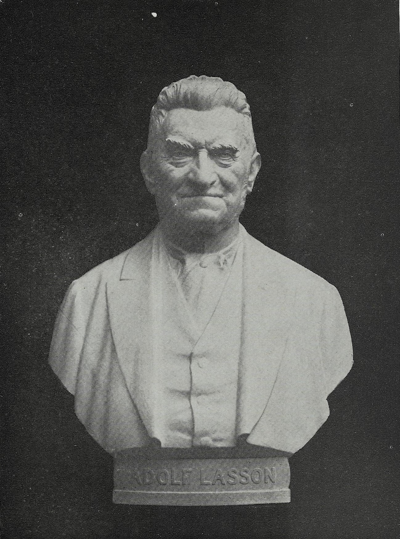 Fritz Heinemann: Büste des Herrn Geh. Reg.-Rats Professor Dr. Adolf Lasson